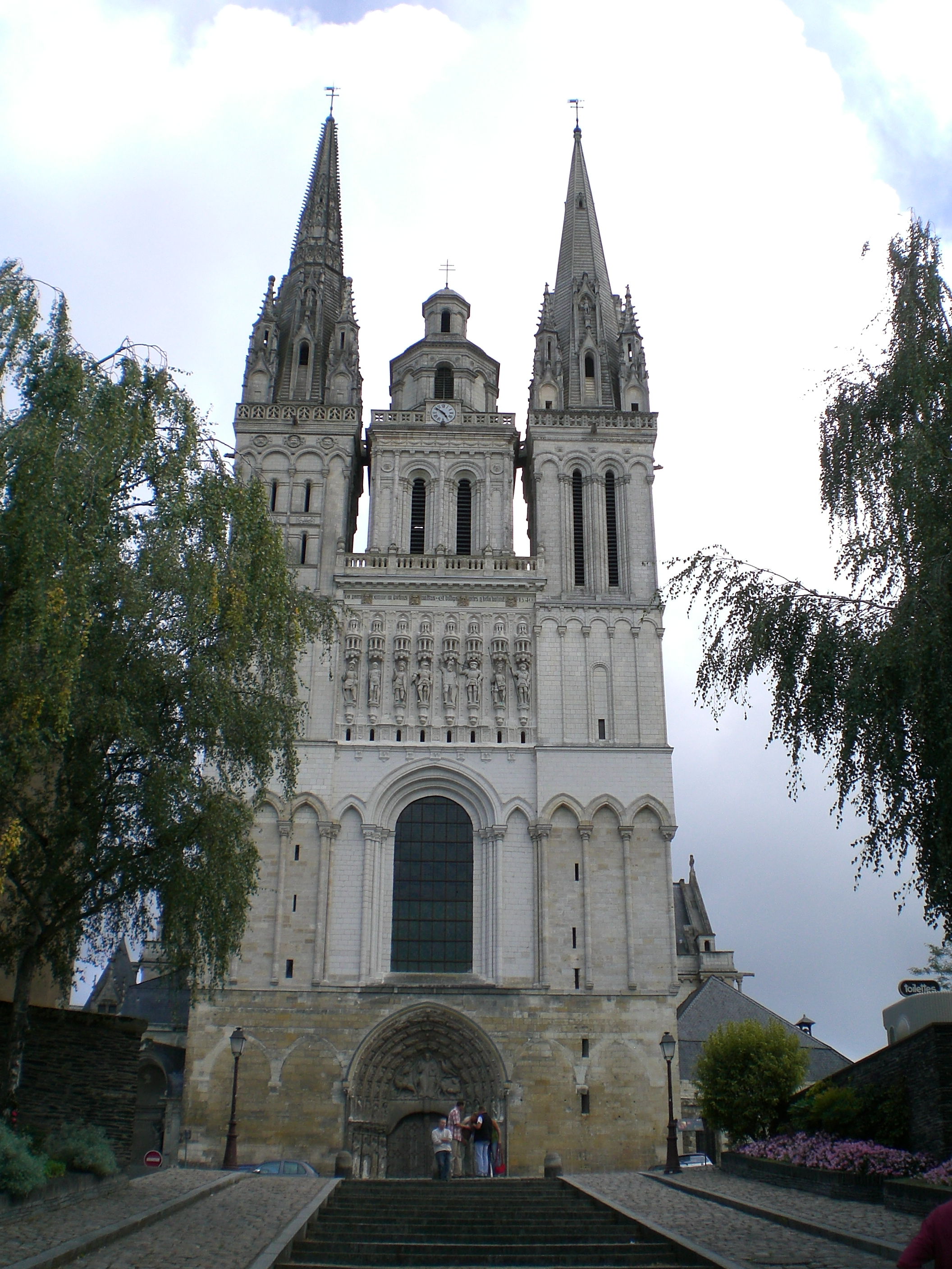 Vue complète de la Cathédrale Saint-Maurice d'Angers laissant plus facilement apprécier les détails architecturaux.